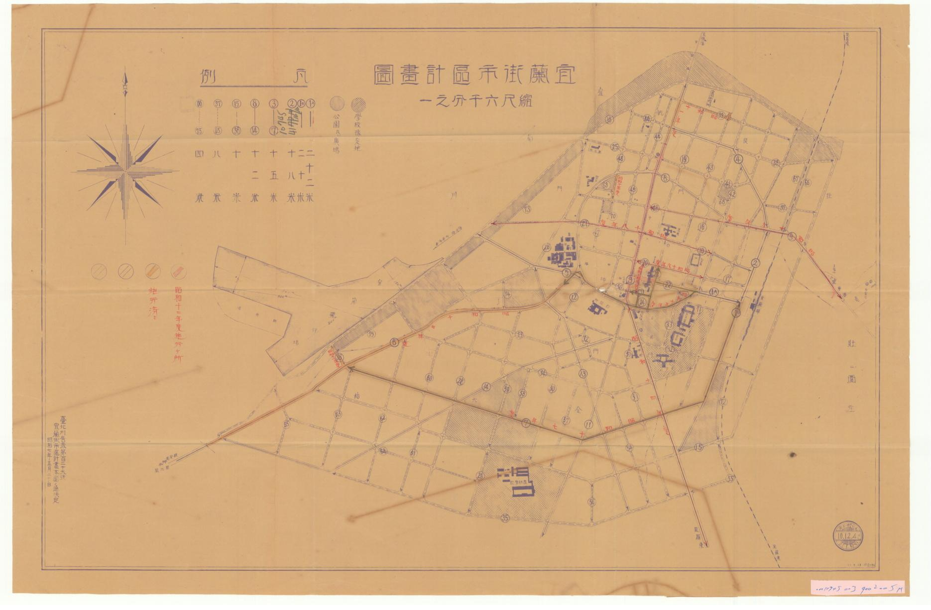 中文（台灣）: 於宜蘭市區西側上尚可見宜蘭飛行場